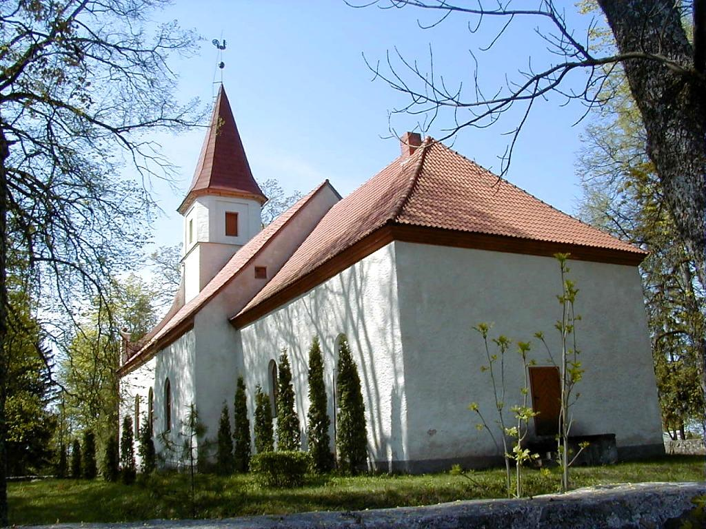 Rubenes baznīca 2000-04-29